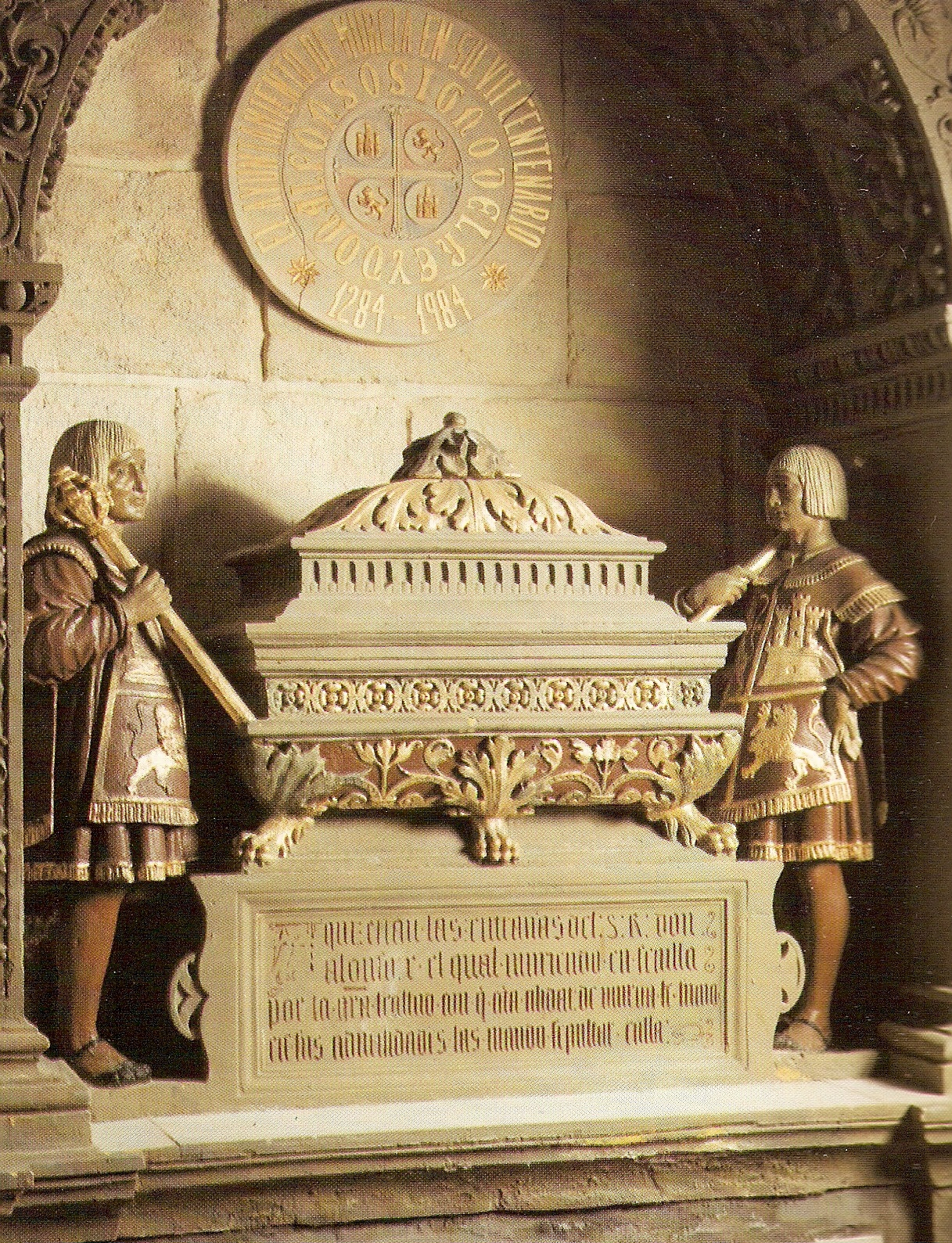 Urna sepulcral que contiene las entrañas de Alfonso X el Sabio (1221-1284), rey de Castilla y León. La urna se encuentra colocada en la capilla mayor de la catedral de Murcia, y el resto del cuerpo del rey se halla en la Capilla Real de la catedral de Sevilla, donde también están enterrados sus padres, el rey Fernando III de Castilla, y la reina Beatriz de Suabia.